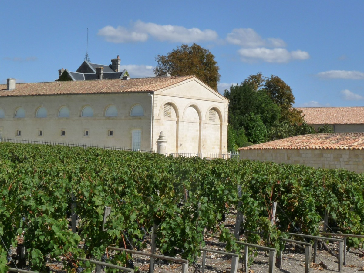 Château de Mouton-Rothschild, Pauillac, Gironde, France